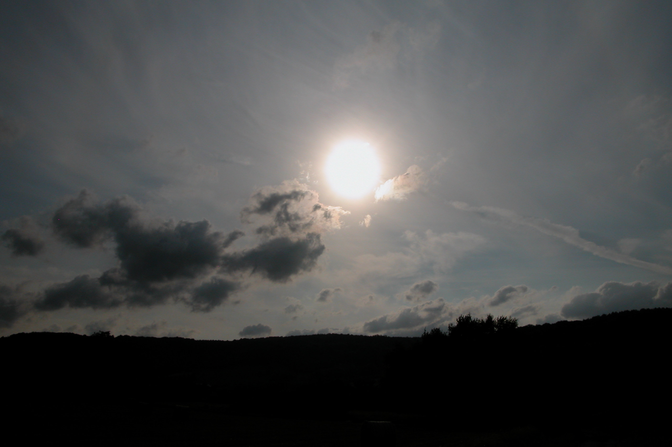 Sun, dusk